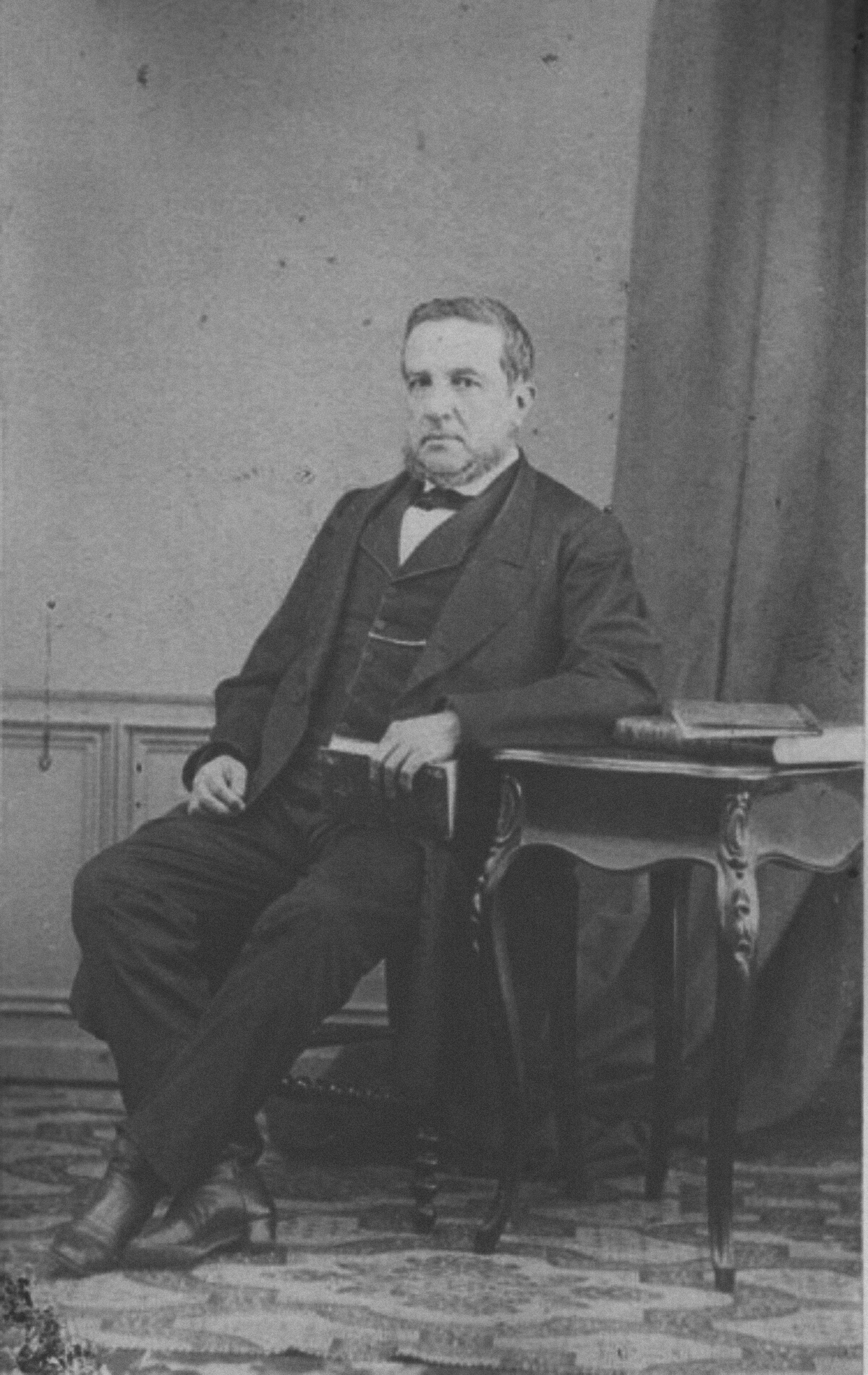 José María Lacunza